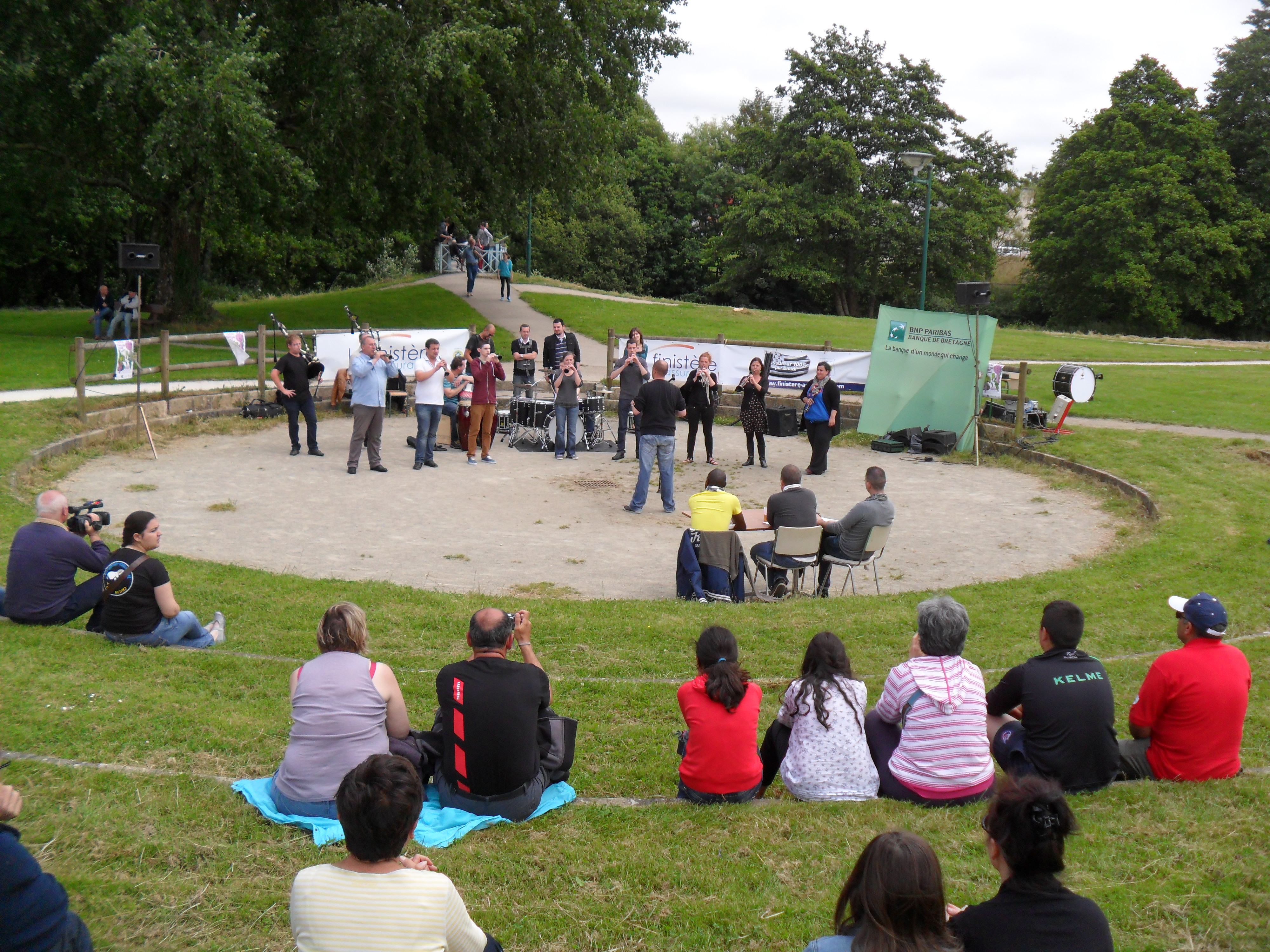 Bagad Penhars à la Fête de la Saint-Jean de 2013 au Moulin Vert Quimper (France